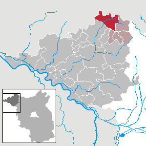 Marienfließ in Brandenburg (Country) - District Prignitz